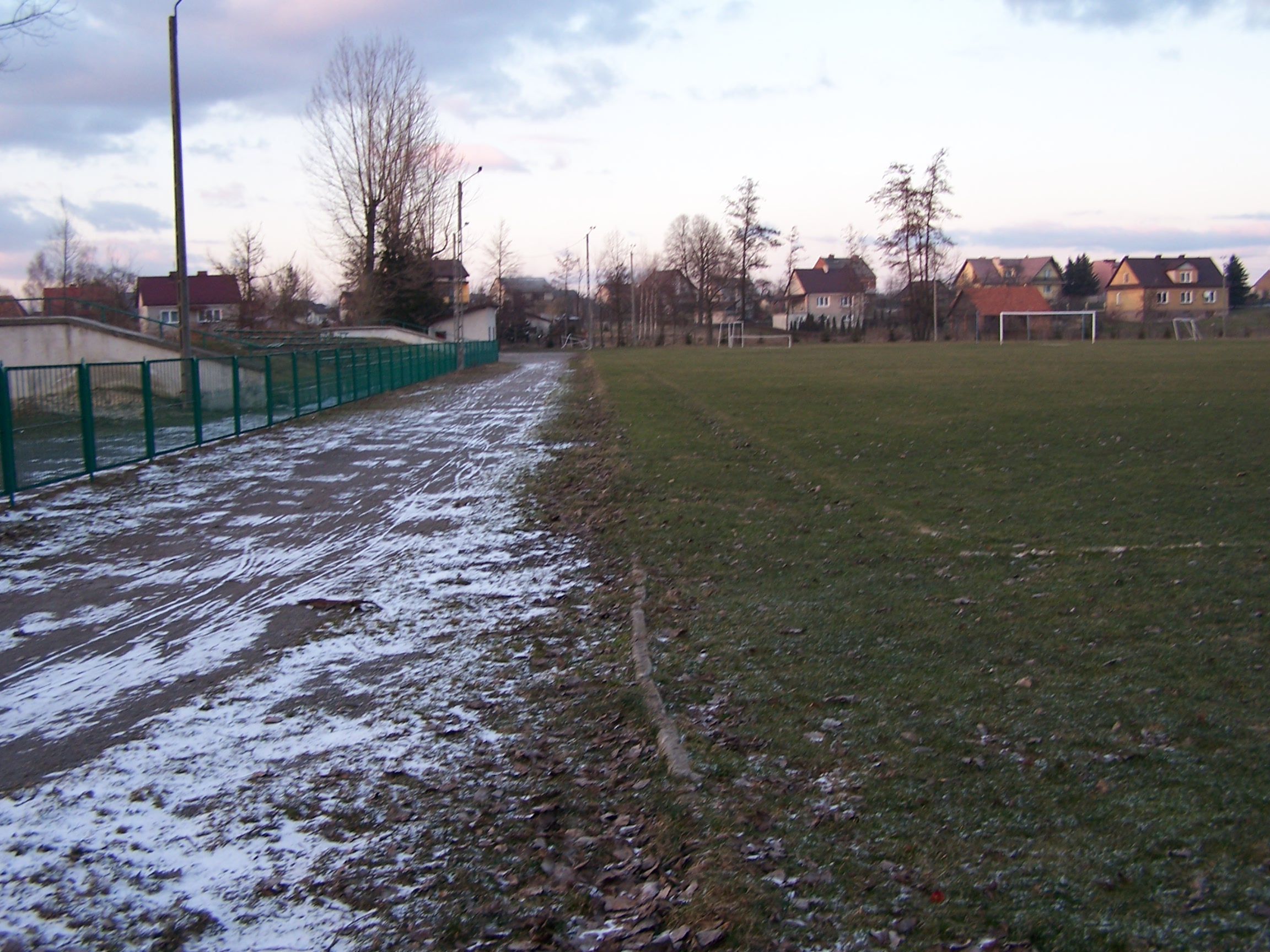 Kłaj, boisko klubu LZS "Wolni Kłaj"